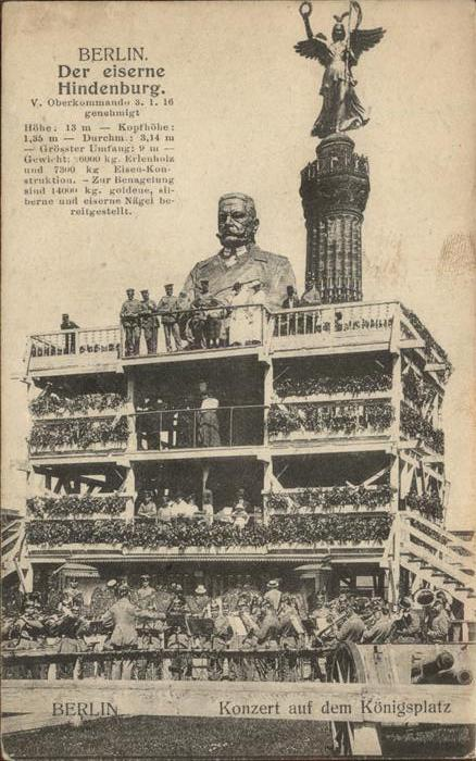 Der Eiserne Hindenburg (Nagelfigur) in Berlin; Ansichtskarte, gelaufen 1916; Verlag E. Nixdorf, Berlin